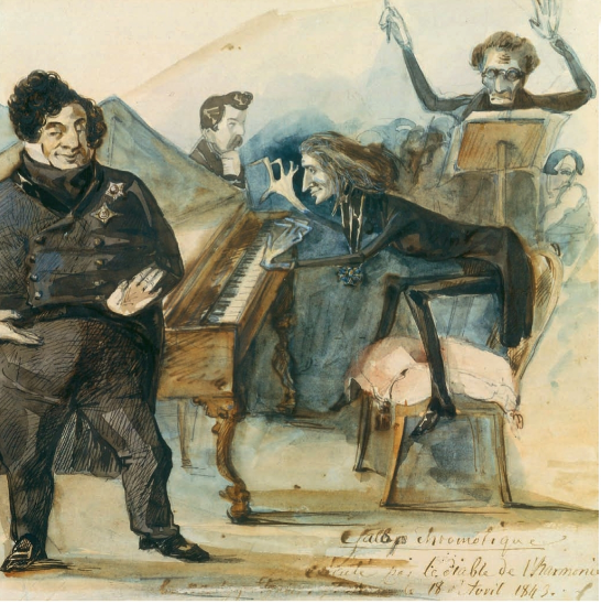 Franz Liszt caricaturé par un anonyme lors d'un concert à Saint-Pétersbourg. Le chanteur à gauche est sans doute le ténor italien Giovanni Battista Rubini (1794-1854). La légende dit : Galop chromatique exécuté par le diable de l’harmonie, 1843 (fonds BnF, bibliothèque-musée de l’Opéra, Musée 382).